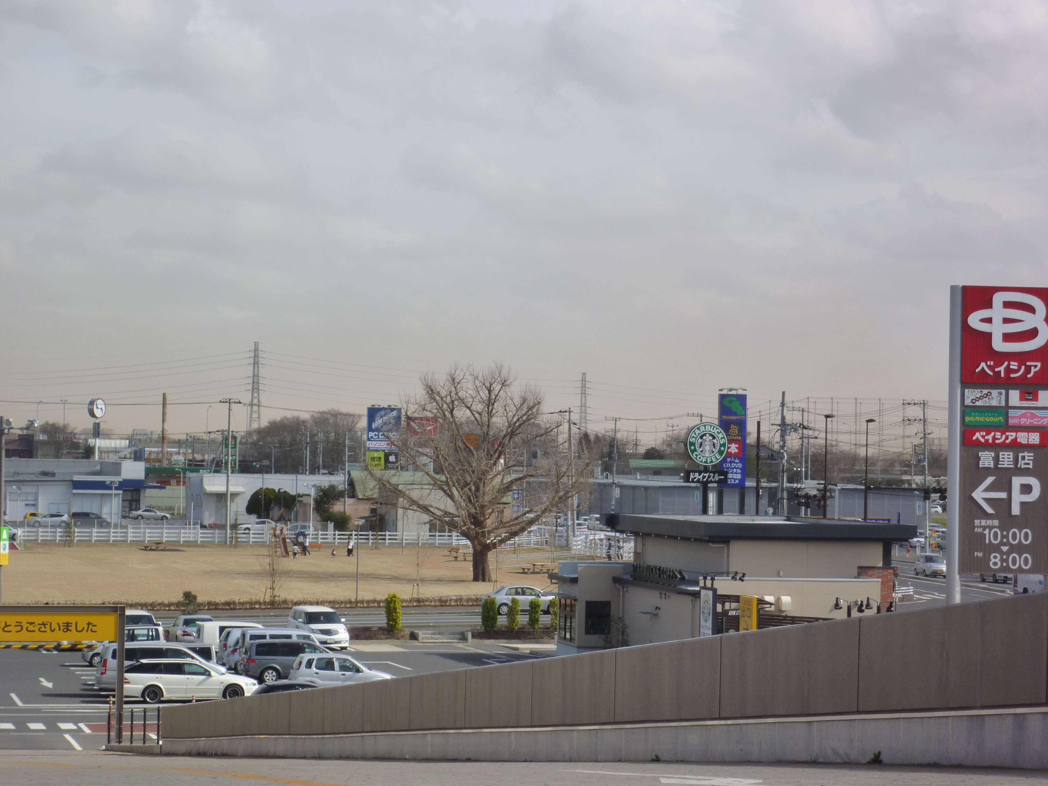 春一番の時の下総台地。画面中央付近の空が赤茶色に染まっている。（ベイシア富里店屋上駐車場から撮影）